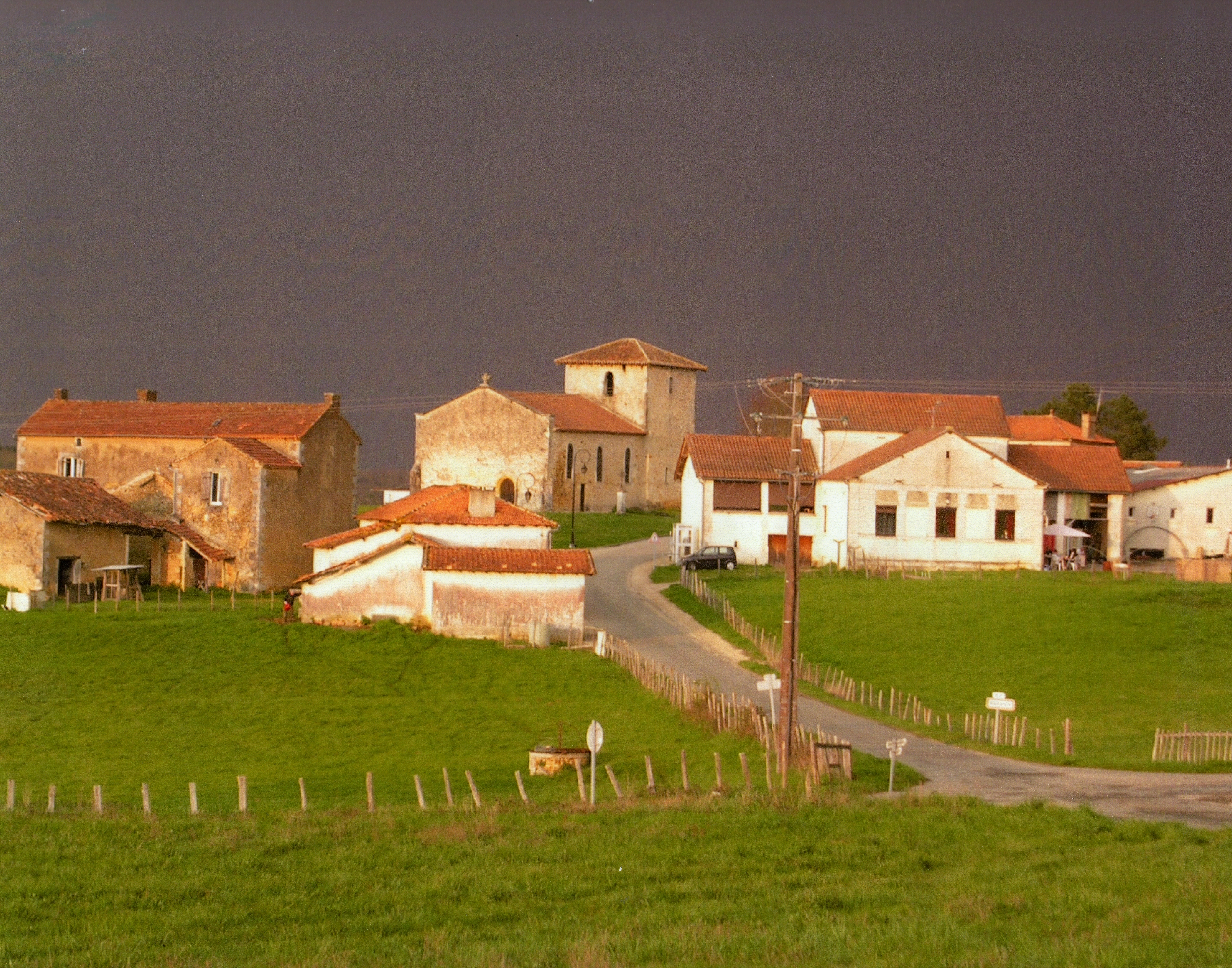 Le Bourg de la commune de BREUILH sous un ciel d'orage